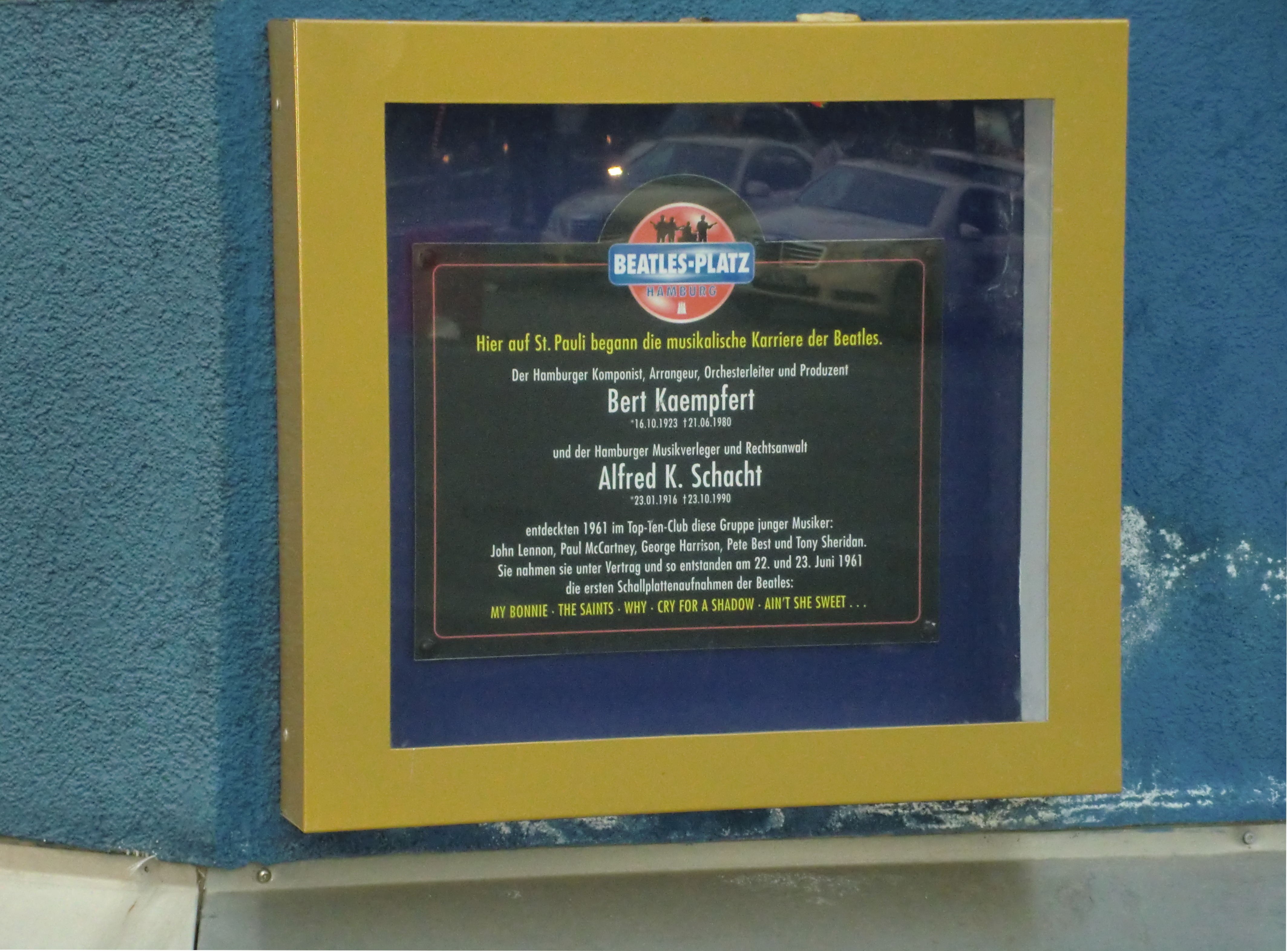 Gedenktafel Beatles Platz Hamburg Hier auf St. Pauli begann die musikalische Karriere der Beatles. Der Hamburger Komponist, Arrangeur, Orchesterleiter und Produzent Bert Kaempfert 16.10.1923 +24.06.1980 und der Hamburger Musikverleger und Rechtsanwalt Alfred K.Schacht 23.01.1916 +23.10.1990 entdeckten 1961 im Top-Ten-Club diese Gruppe junger Musiker: John Lennon, Paul McCartney, George Harrison, Pete Best und Tony Sheridan. Sie nahmen sie unter Vertrag und so entstanden am 22. und 23. Juni 1961 die ersten Schallplattenaufnahmen der Beatles: MY BONNIE . THE SAINTS . WHY . CRY FOR A SHADOW . AIN'T SHE SWEET ...